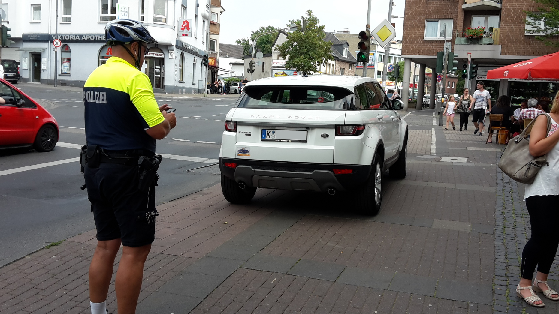 Polizei Köln - die tun was! 25 EUR für Parken mit Behinderung auf Radweg und Bürgersteig